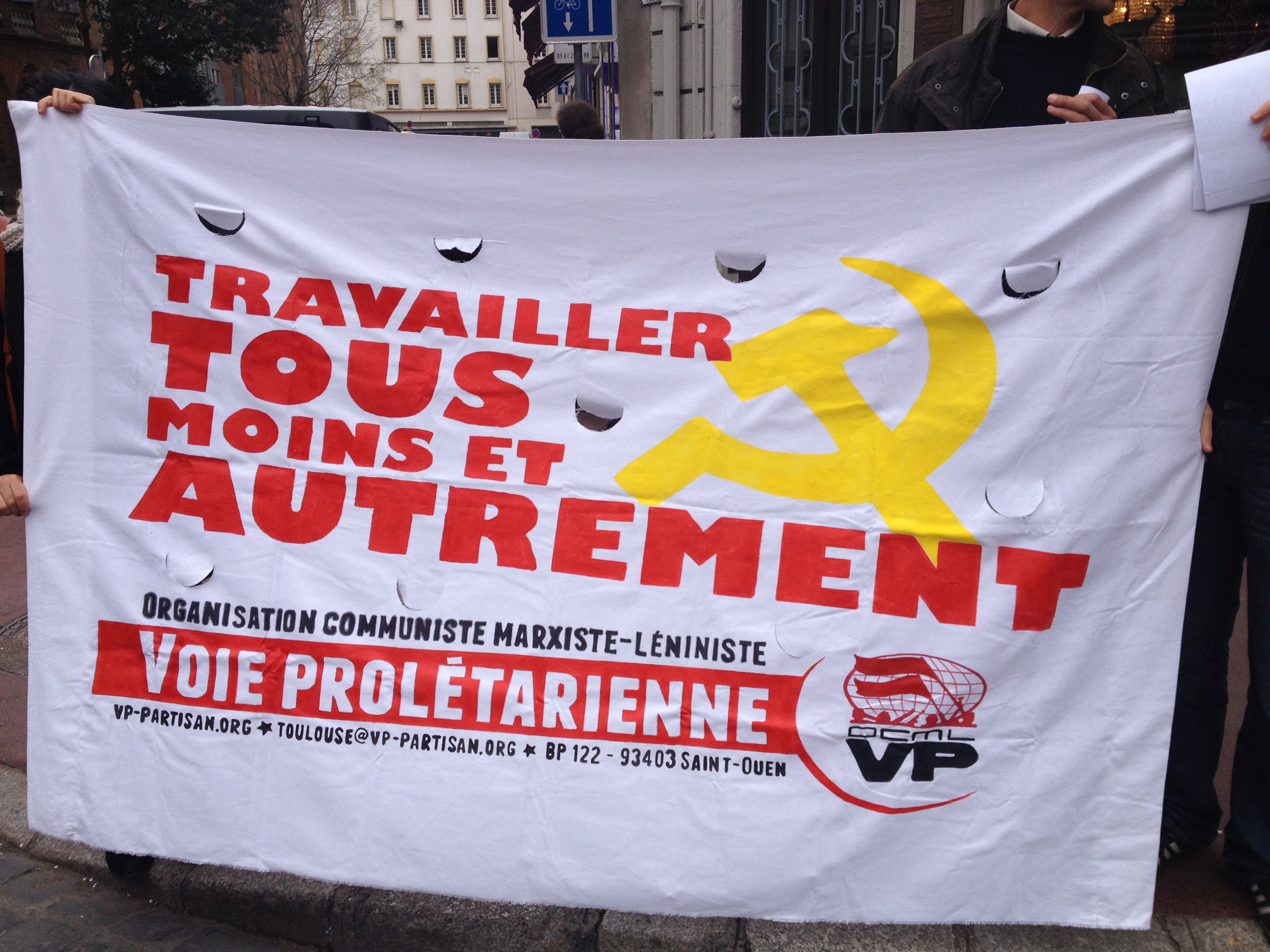 Banderole de l'OCML Voie Prolétarienne lors de la mobilisation contre l'ANI